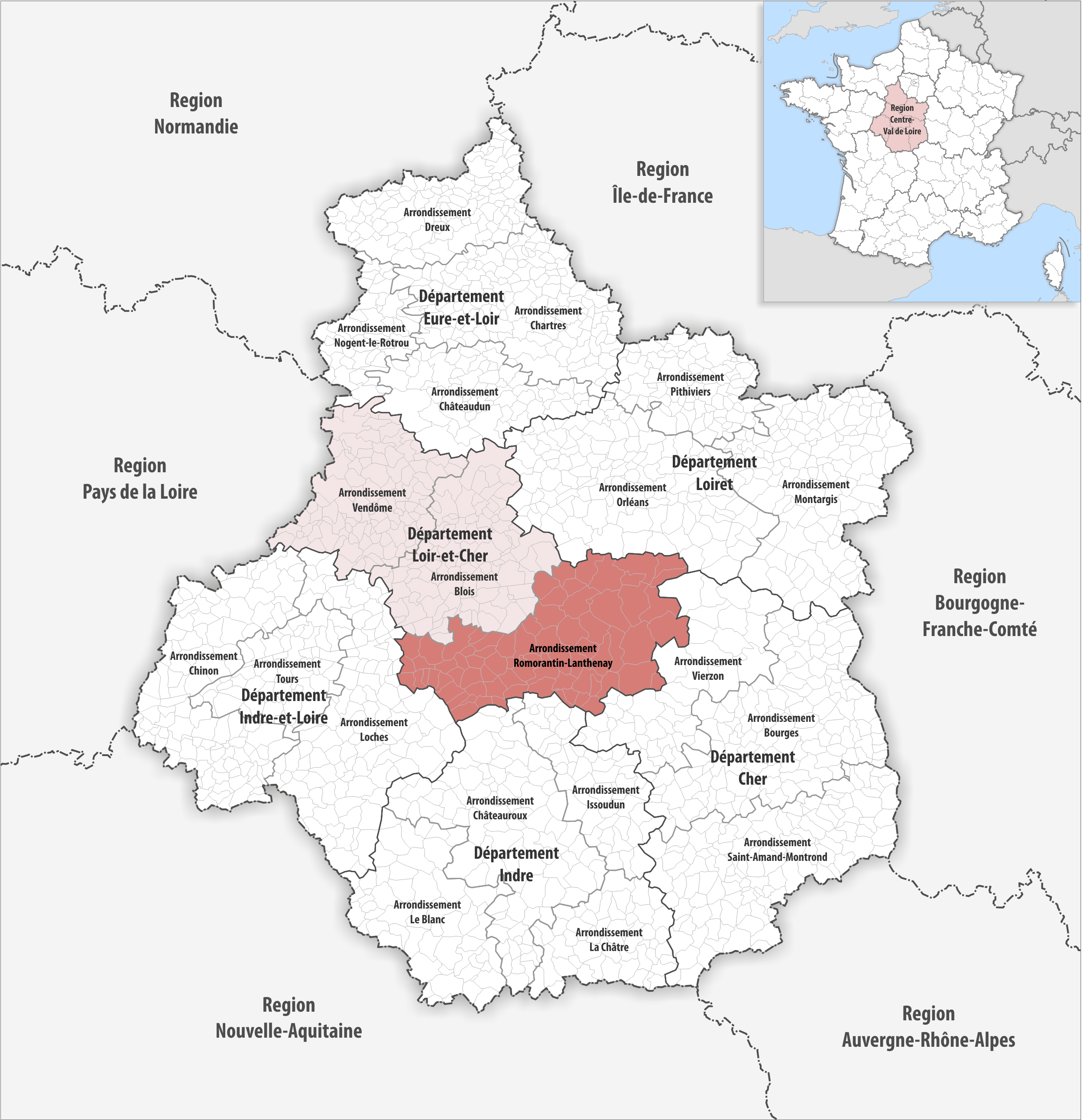 Lage des Arrondissements Romorantin-Lanthenay